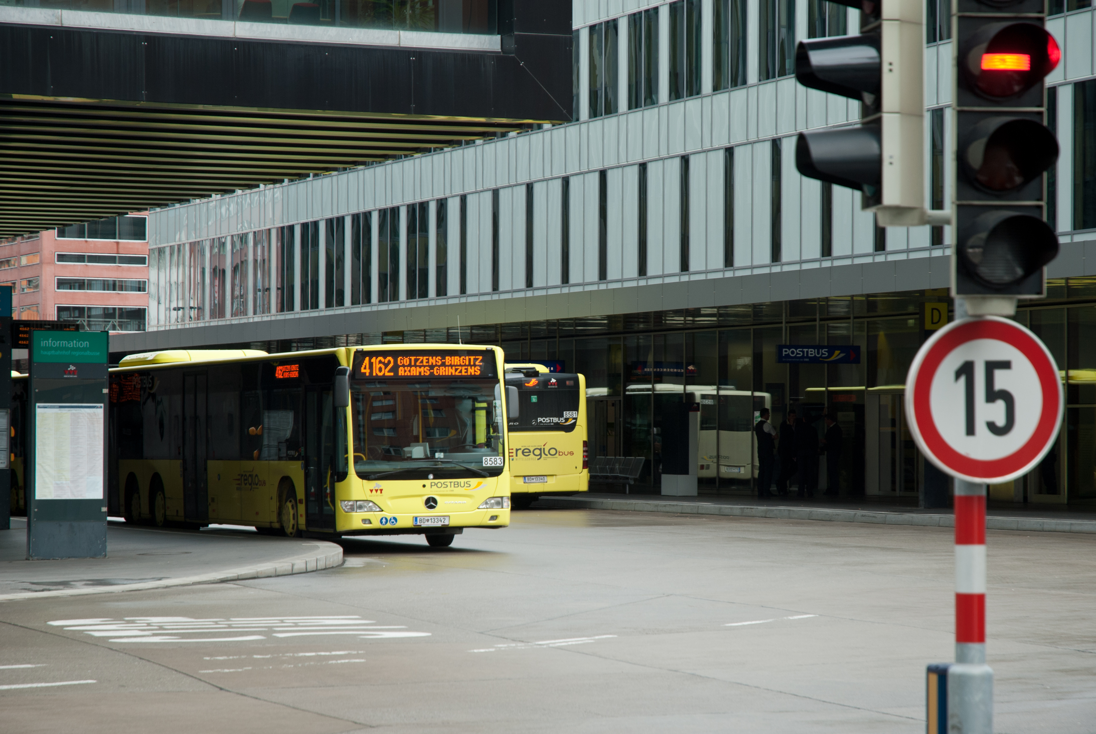 Innsbrucker Busbahnhof beim Hauptbahnhof Innsbruck